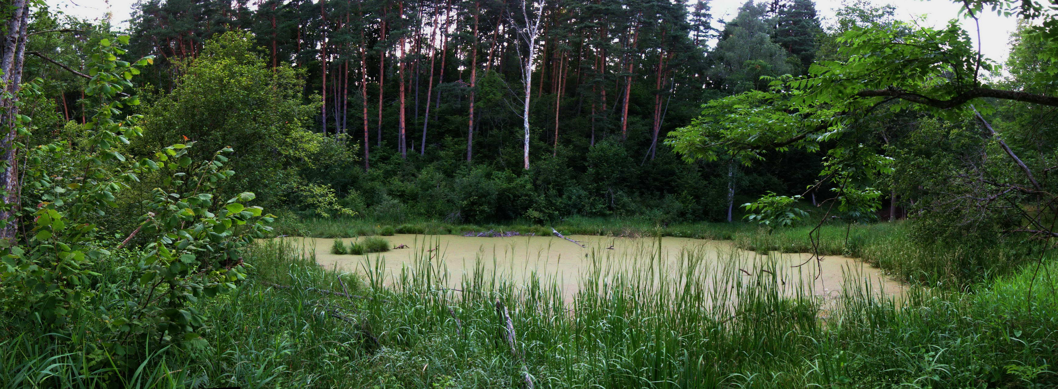 Karalienės liūnas, Anykščių raj.